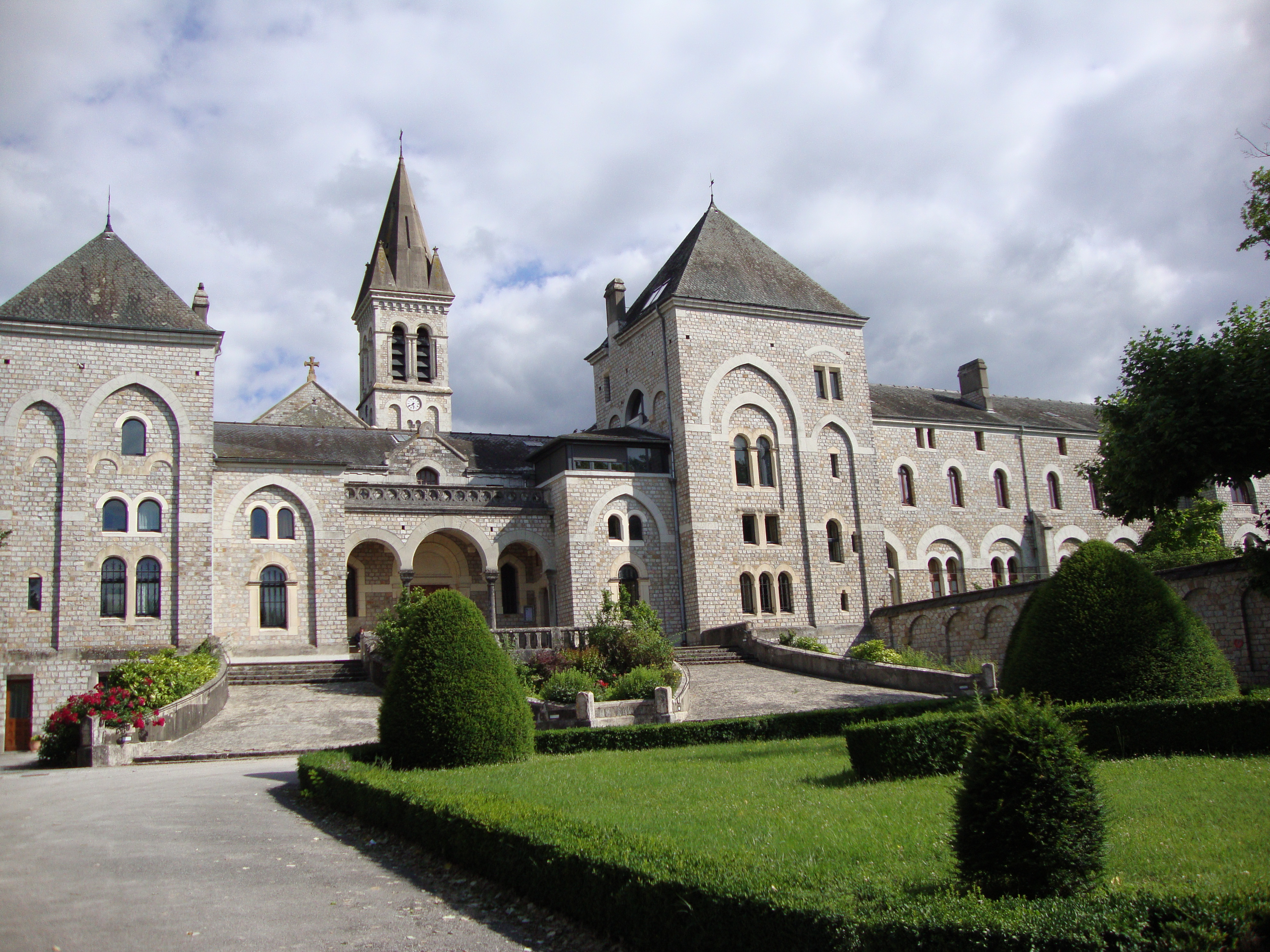 Dourgne (Tarn, Fr) Abbaye Sainte-Scholastique d'En Calcat